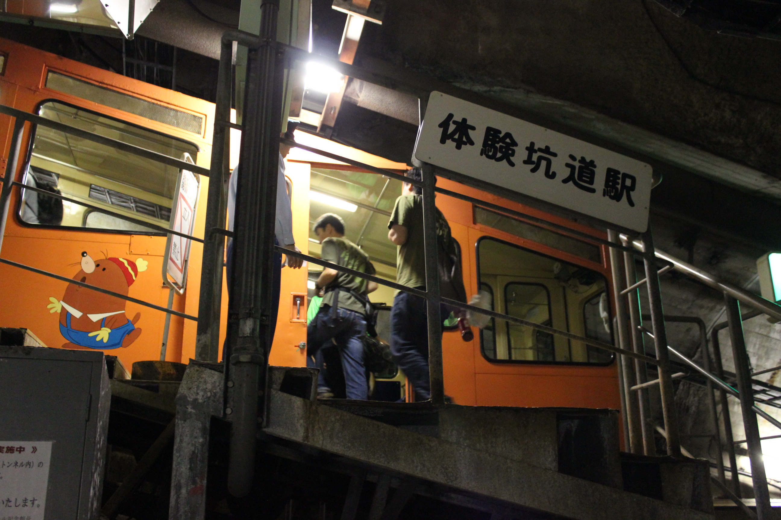 竜飛斜坑線・体験坑道駅「もぐら号」